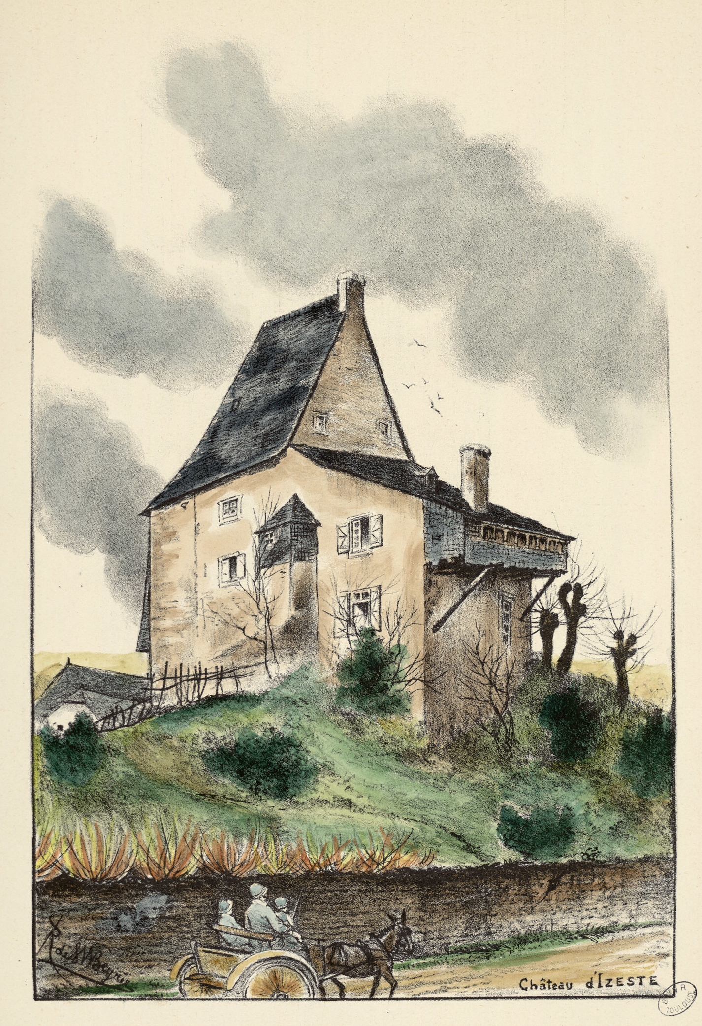 Ancely, René (1876 - 1966). Possesseur